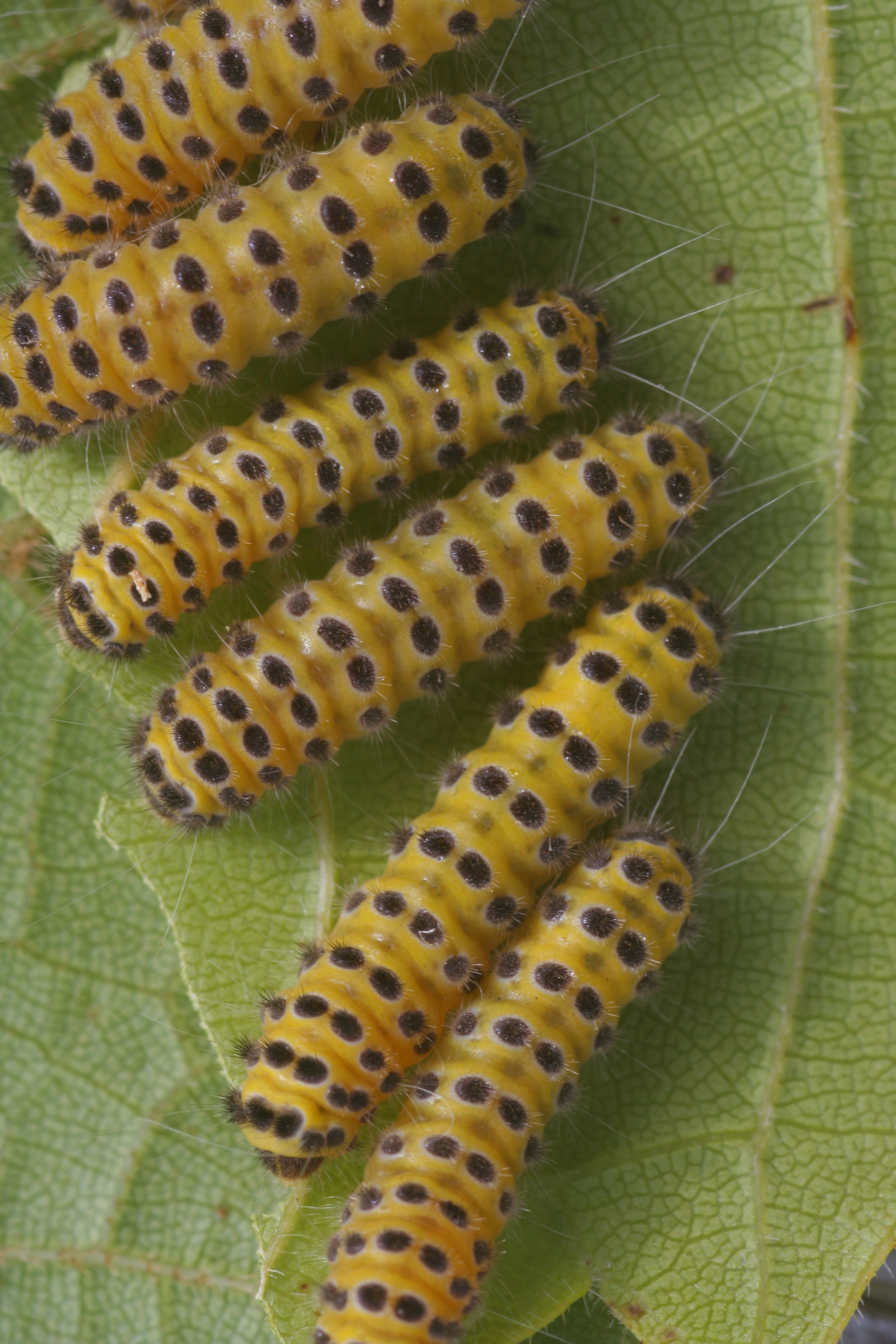 Harrisina americana, grapeleaf skeletonizer larvae